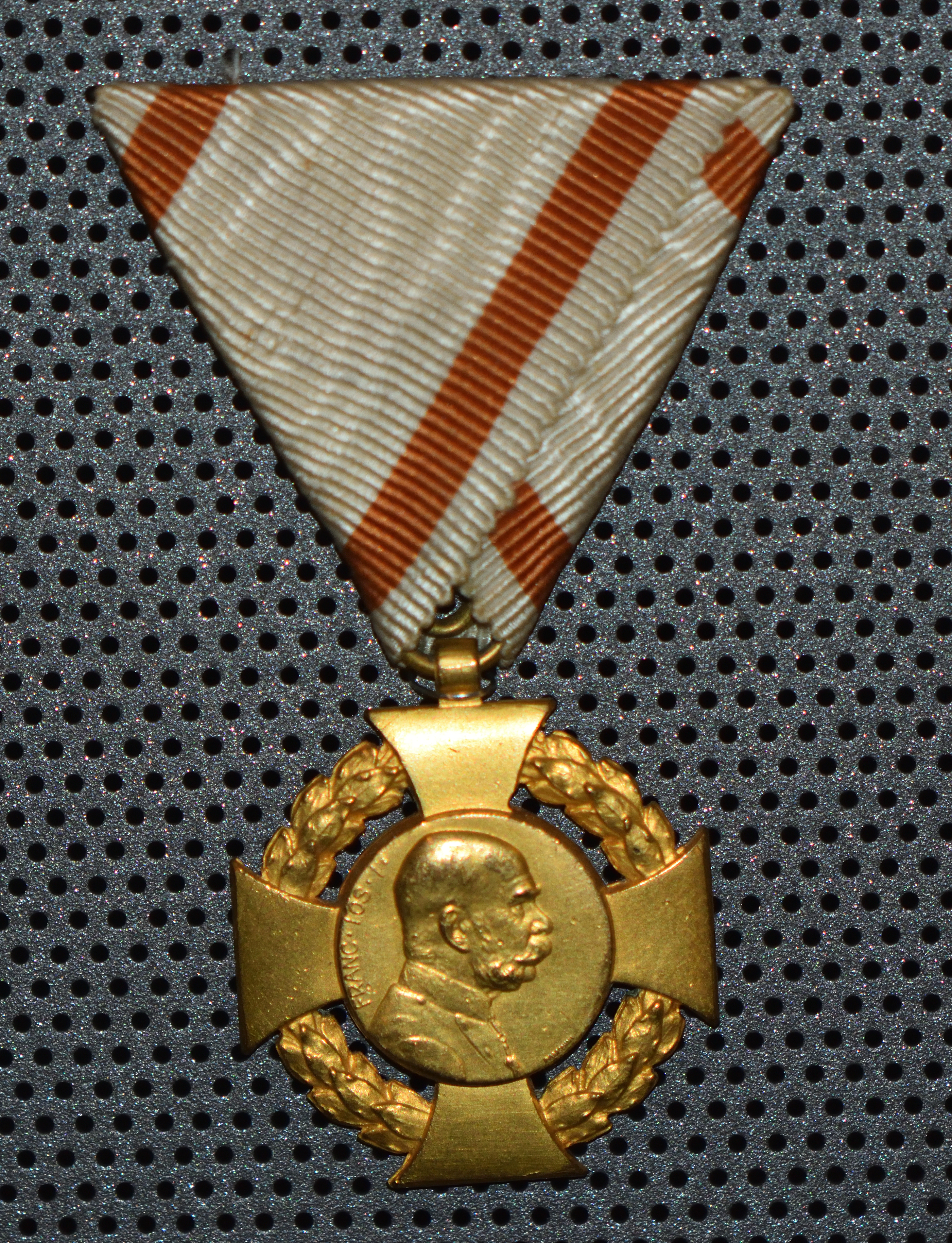 Krzyż Jubileuszowy Wojskowy (Austro-Węgry)